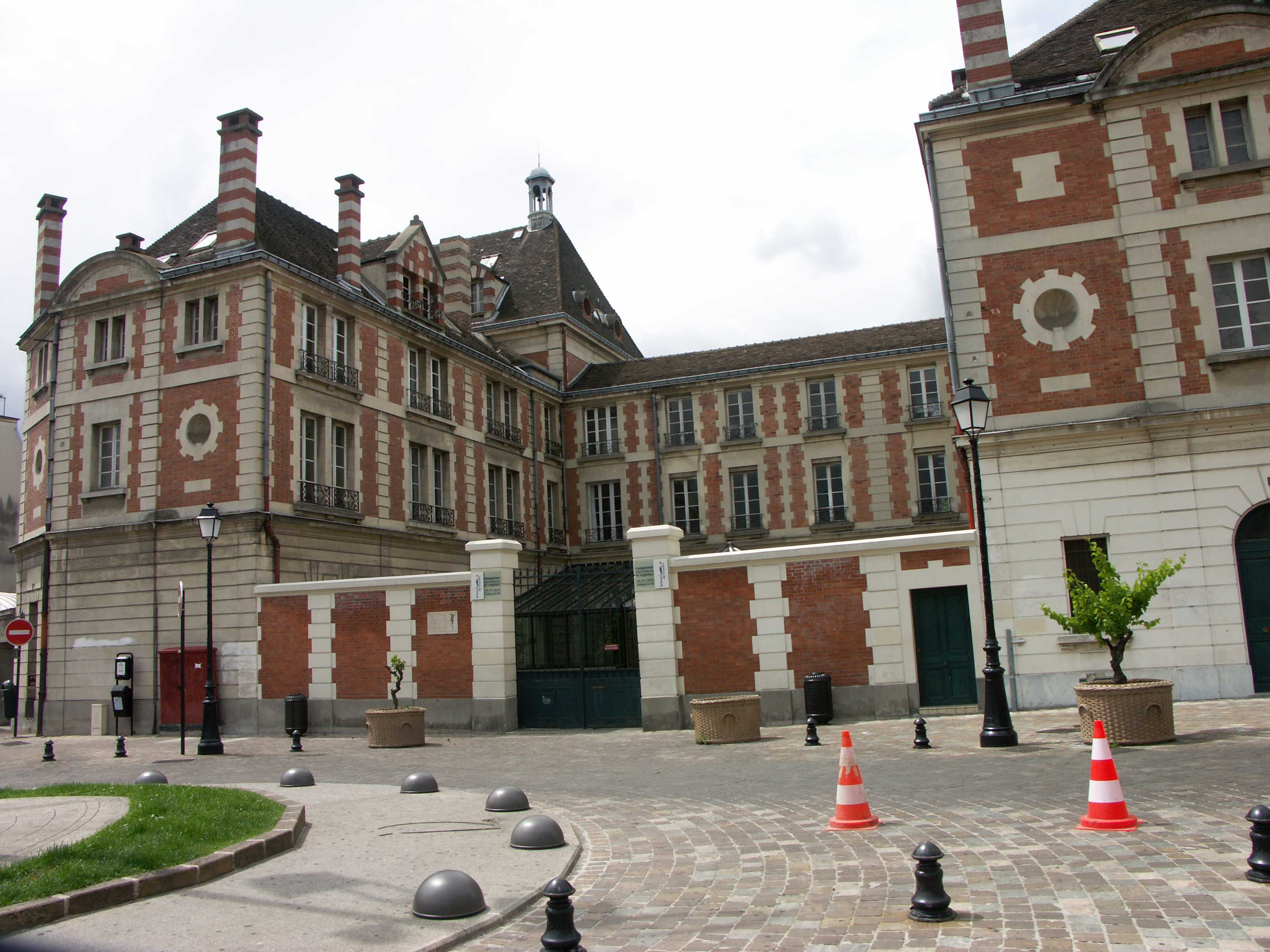 Lycée Teilhard de Chardin - Saint Maur des Fossés - Val de Marne - France